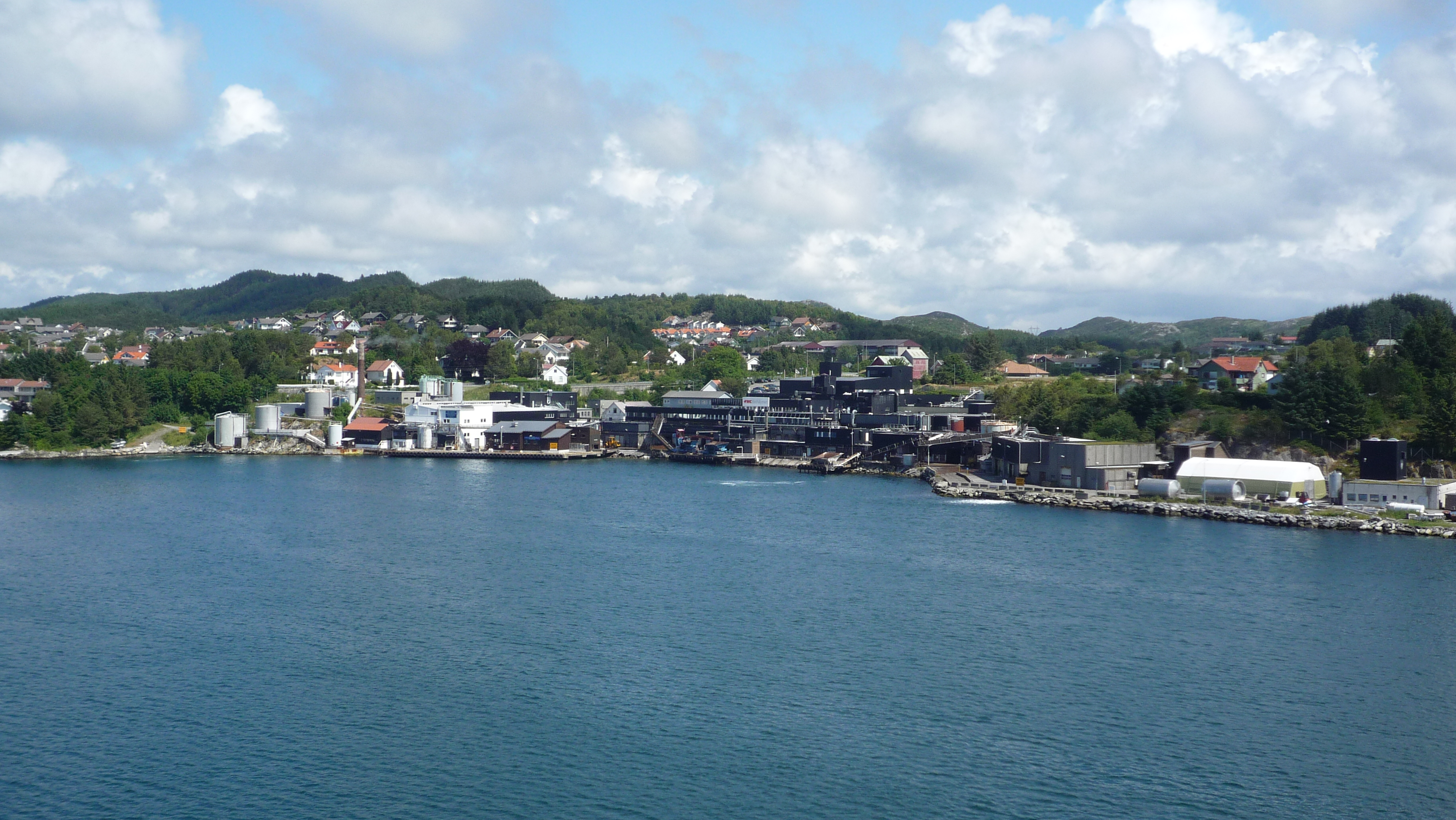 Vormedal ved Karmsundet. Industrianglegget tilhøyrer FMC Biopolymer AS